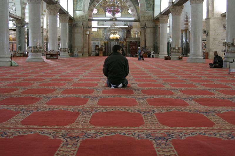 Jerusalem, January 2008